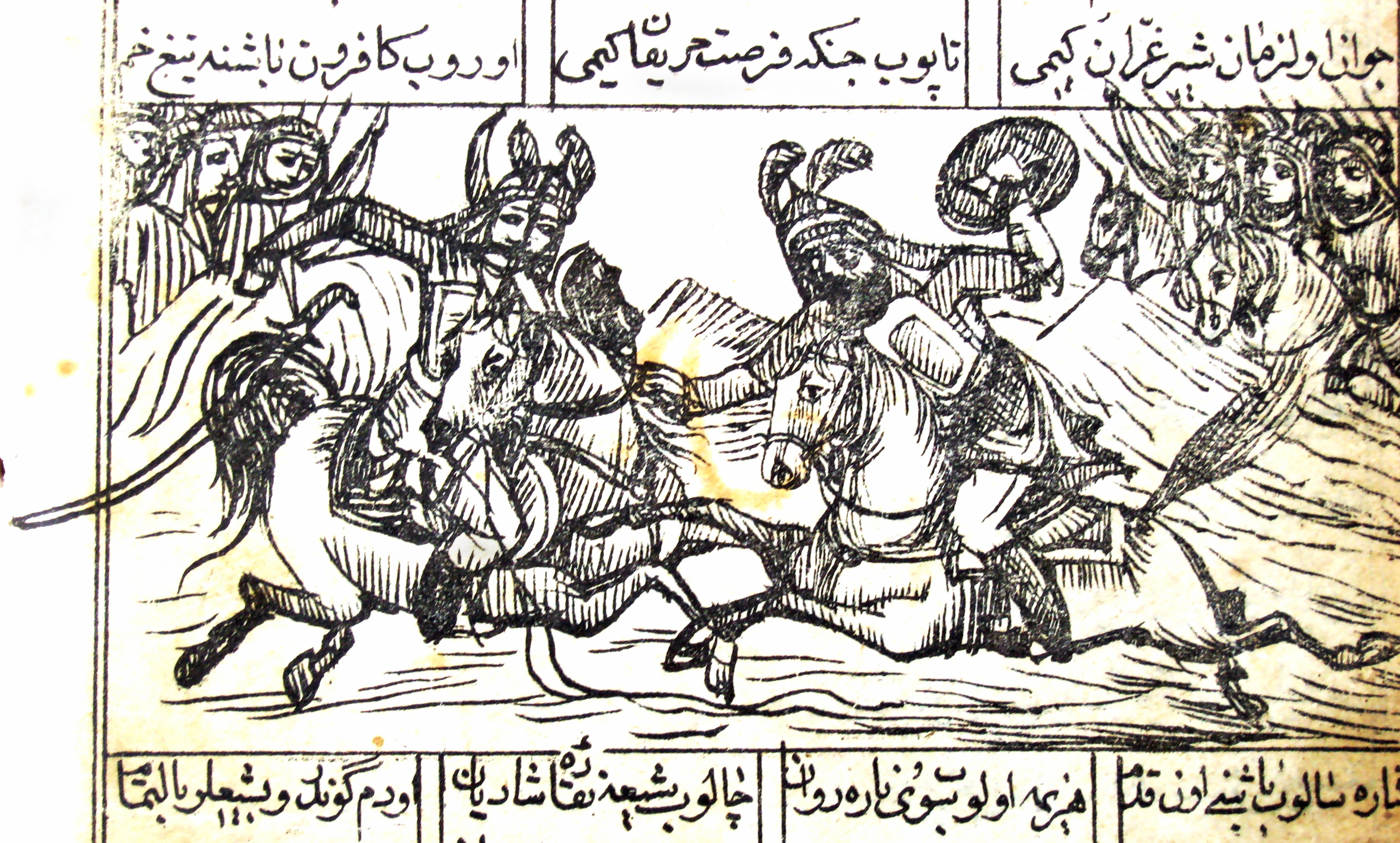 طراحی صحنه پیکار انتقام شهدای کربلا، آنچه که کین حسین‌بن‌علی یا ثارالله نامیده شده است